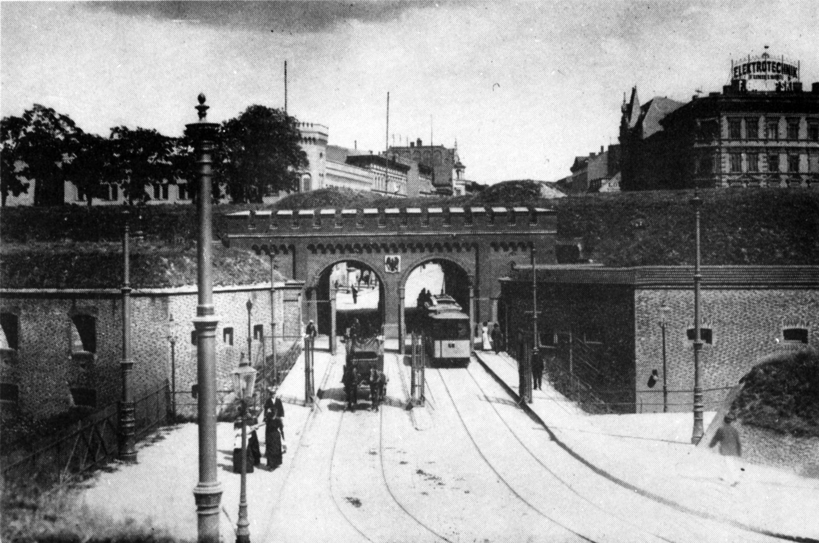 Brama Berlińska - widok od zewnątrz